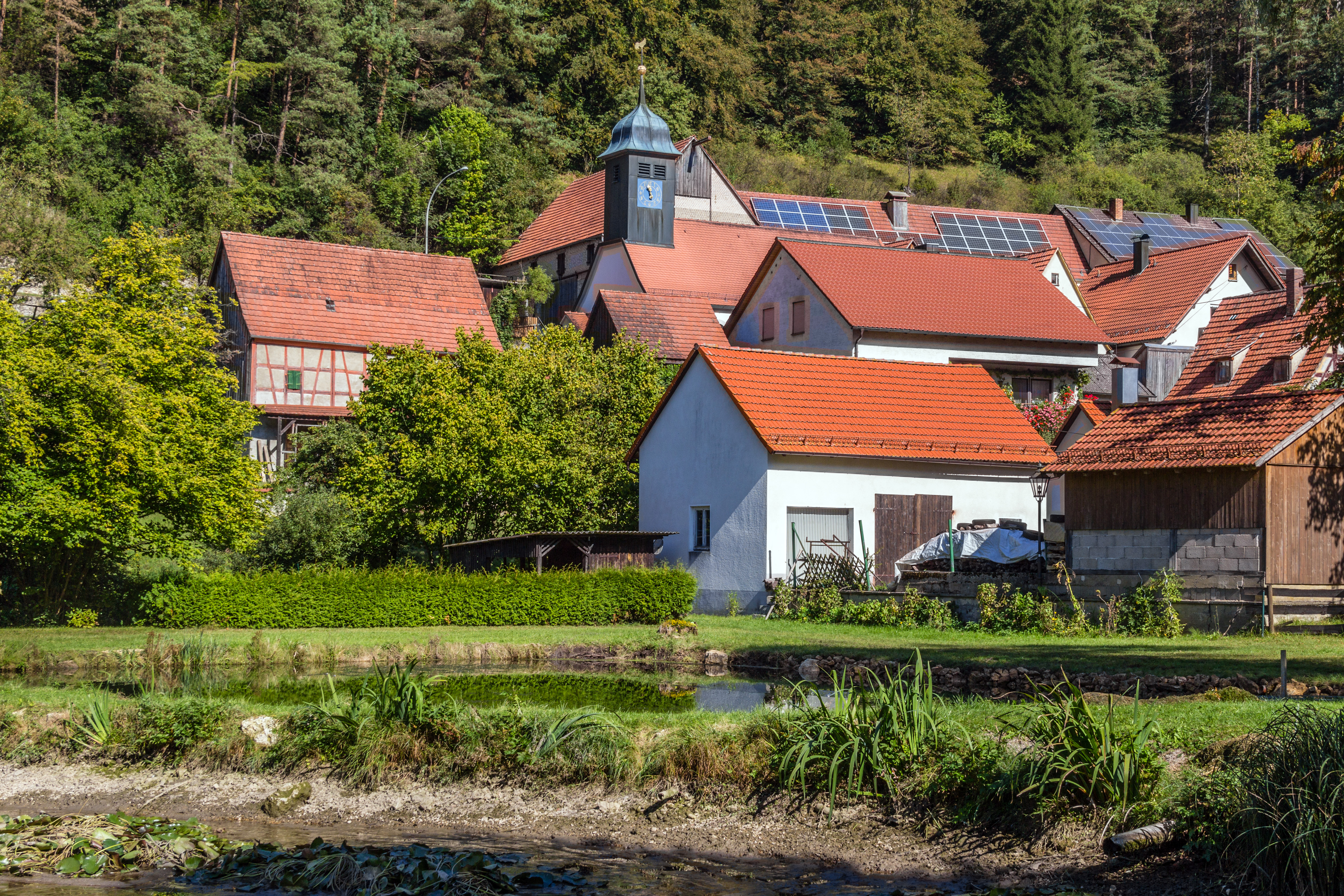 Hirschbach, Oberpfalz, Schlosskapelle, Ortskern